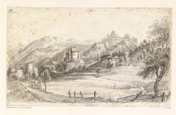 Bezeichnung im Bildarchiv Austria der ÖNB: Ansitz Halbenstein (Hörbranz V BH Bregenz) und Ruine Ruggburg (Möggers V BH Bregenz): "Halmstein Rugburg". Bleistiftzeichnung von Johanna von Isser (1802-1880), um 1827.